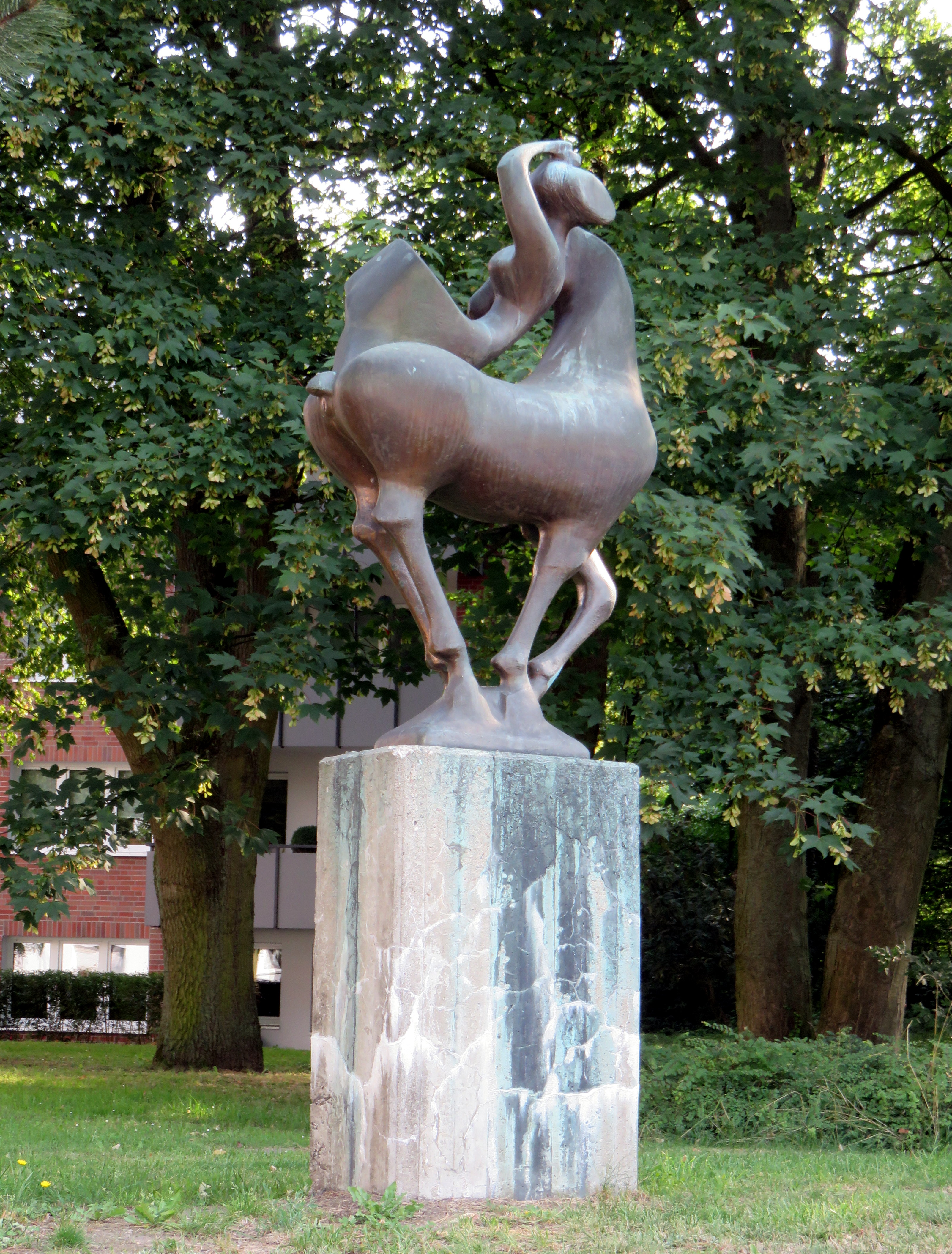 Bronze-Skulptur Akrobatin auf Pferd (1967) der deutschen Bildhauerin Gisela Engelin-Hommes, Kreuzung Spitzbergenweg/Meiendorferstraße in Meiendorf.